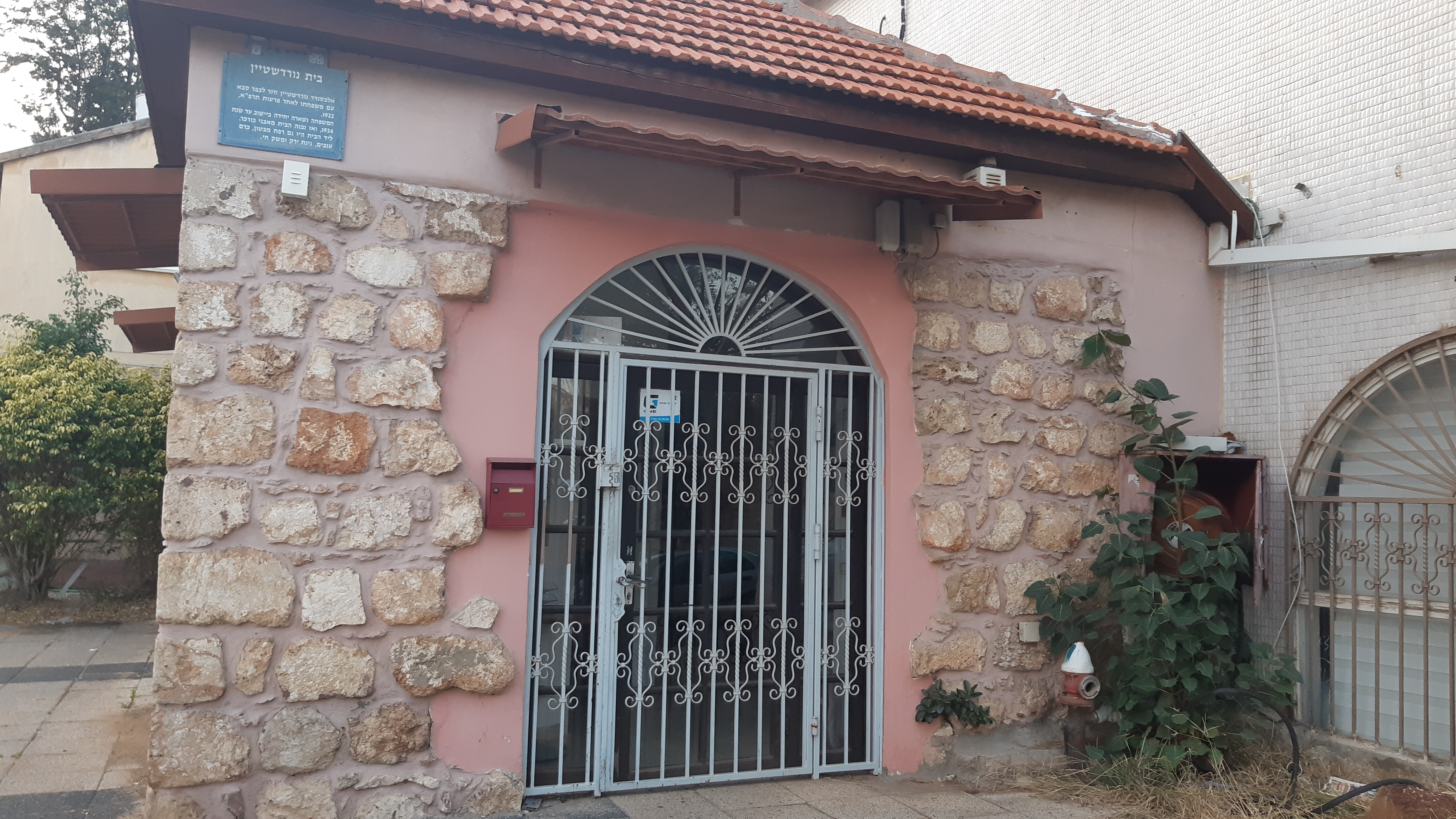 בית נורדשטיין - כפר סבא